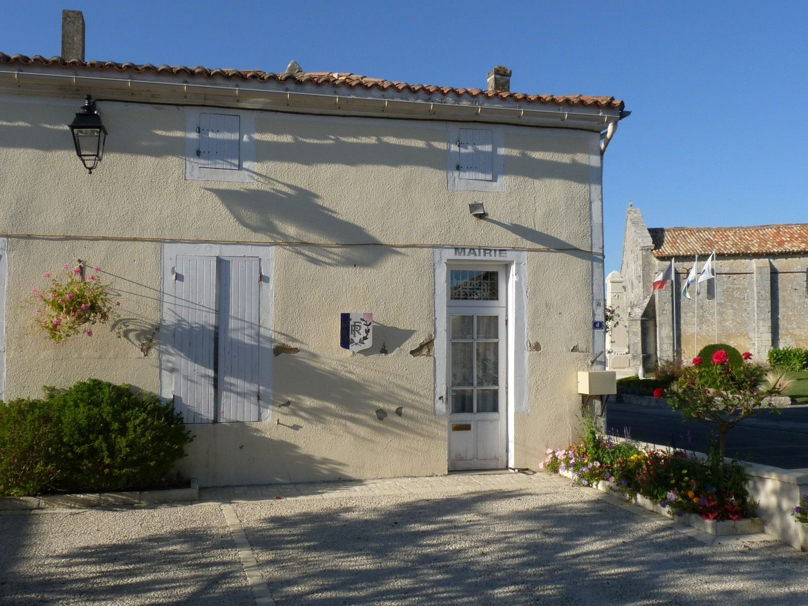 Mairie de Consac, Charente-Maritime, France